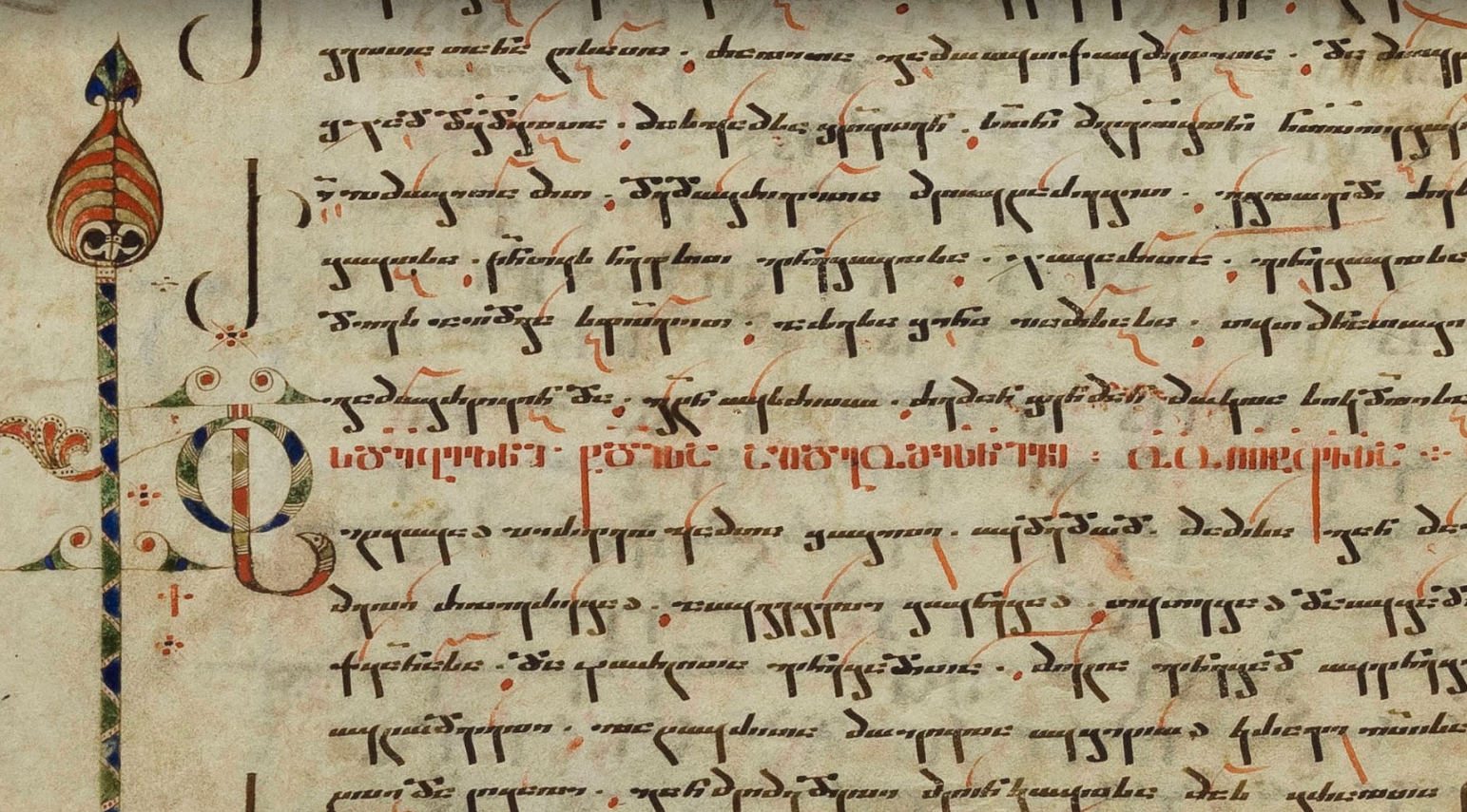 ფრაგმენტი მიქაელ მოდრეკილის იადგარიდან, X საუკუნე, ქართული მუსიკალური ნევმები